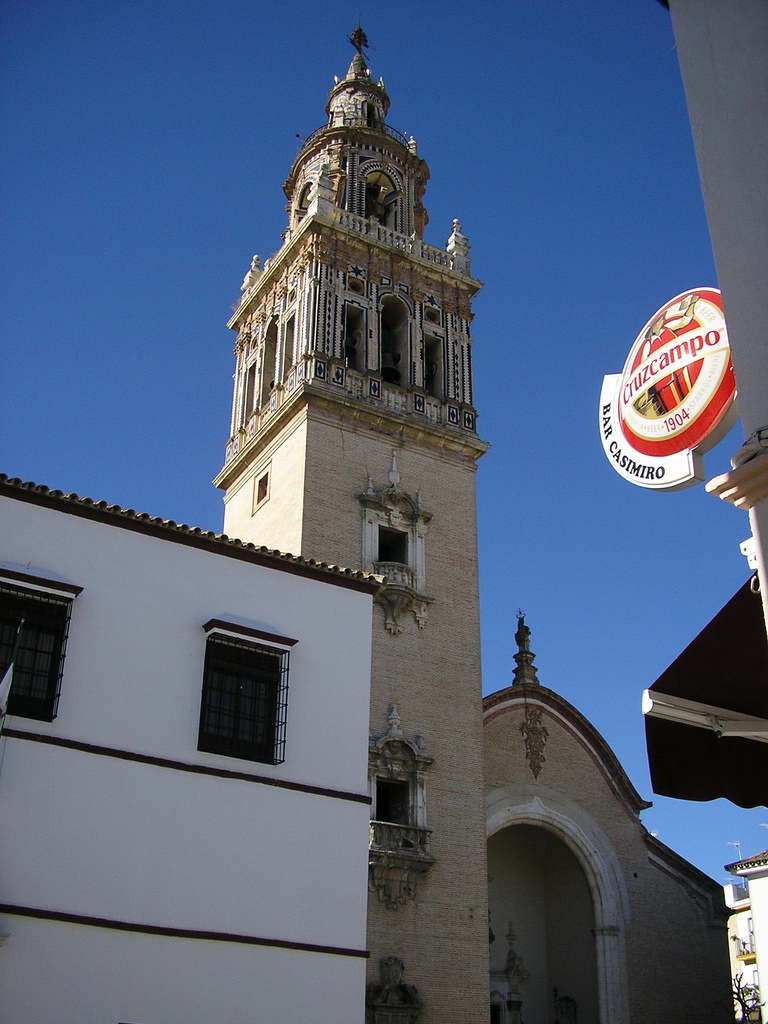 Iglesia de Santa María, Ecija (Sevilla, Andalucía, España)